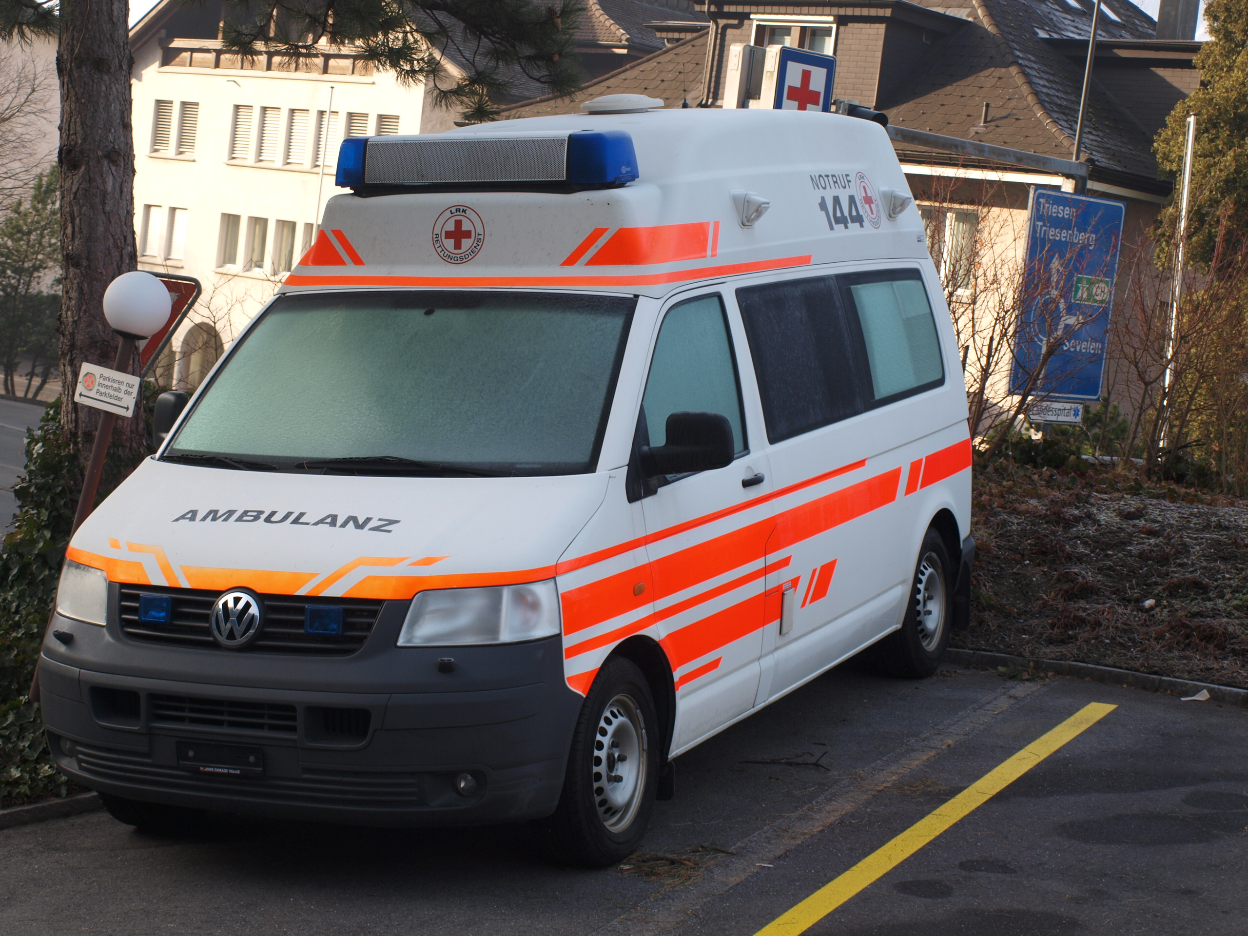 Liechtensteinisches Rotes Kreuz (LRK) - Einsatzfahrzeug - Landesspital in Vaduz